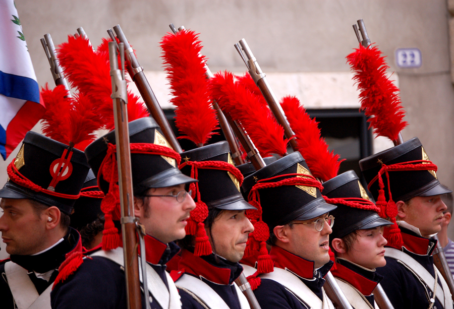 Milizie francesi in posizione durante la rievocazione delle Pasque Veronesi